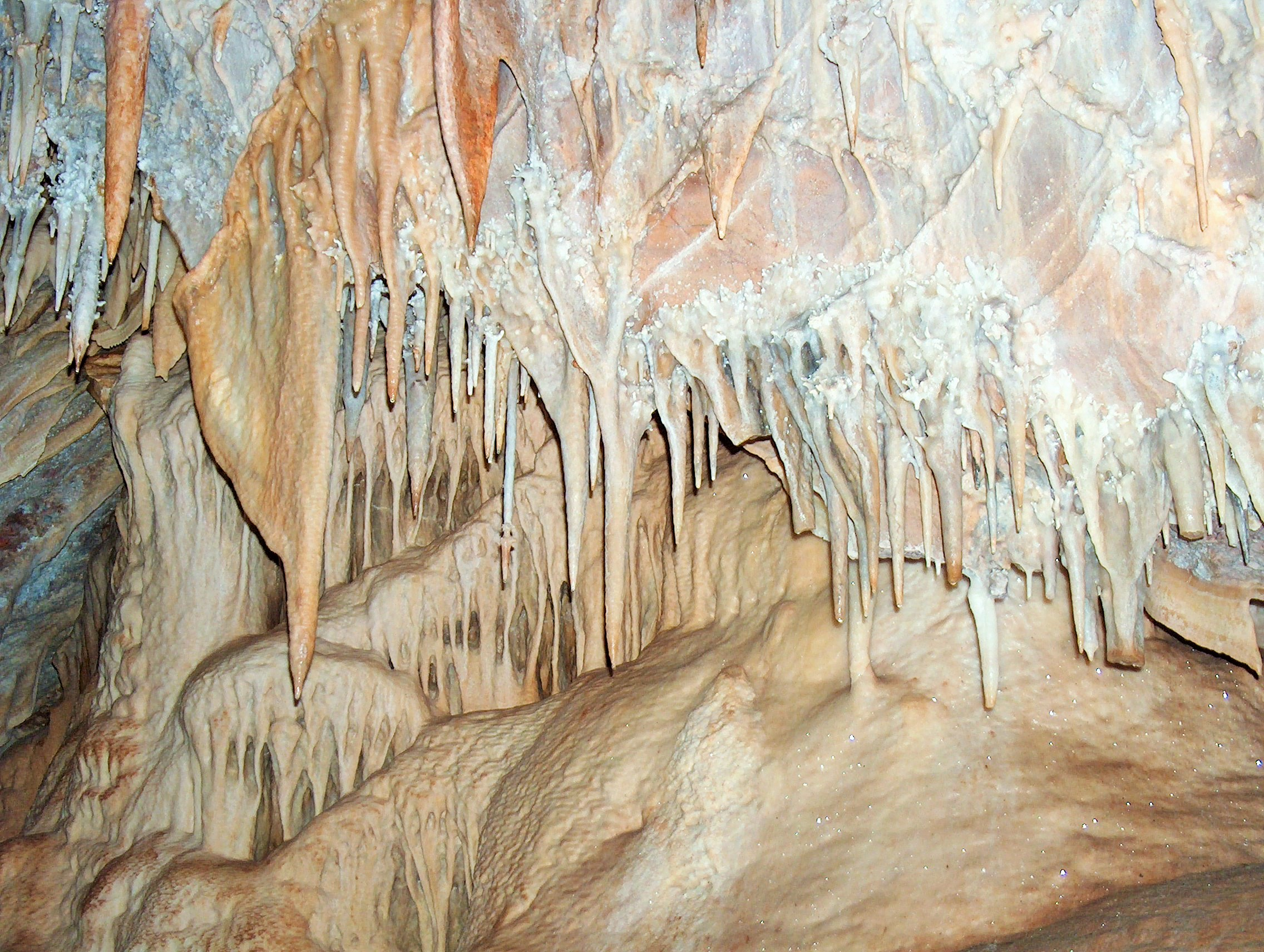 Cueva-1